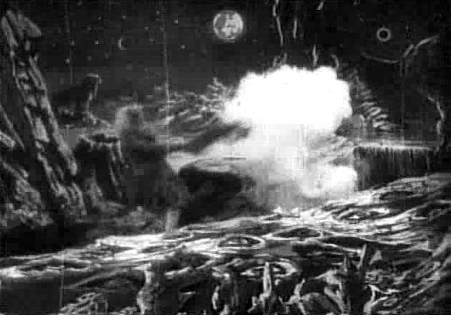 Méliès, viaggio nella luna (1902) 11